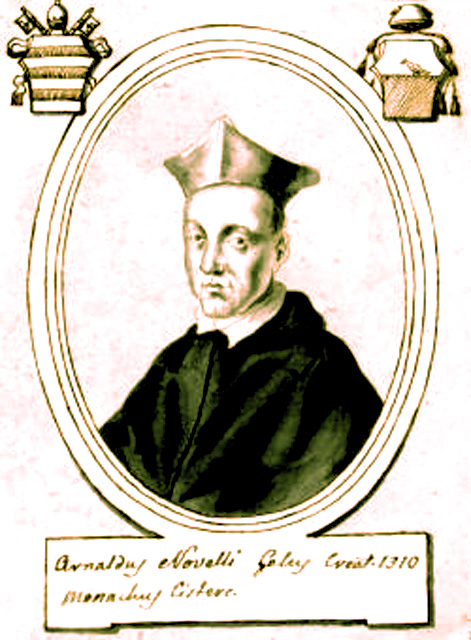 Cardinal Arnaud Novel